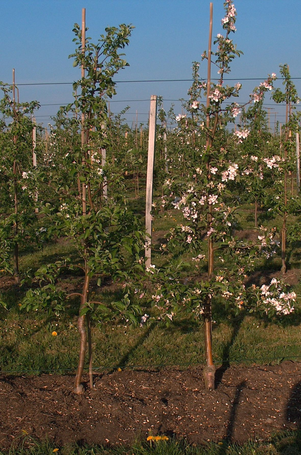 zwei Bäume der Sorte Elstar, einer davon alternierend